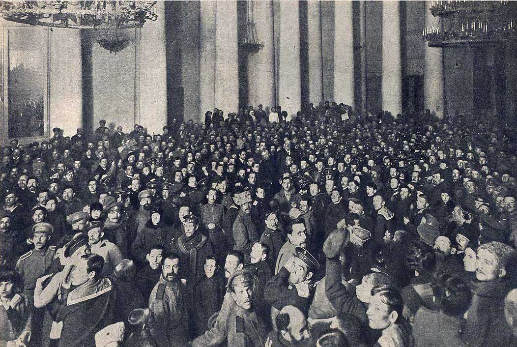 В Екатерининском зале Таврического дворца: председатель Государственной Думы Российской империи М. В. Родзянко среди чинов армии и флота, перешедших на сторону Временного правительства.